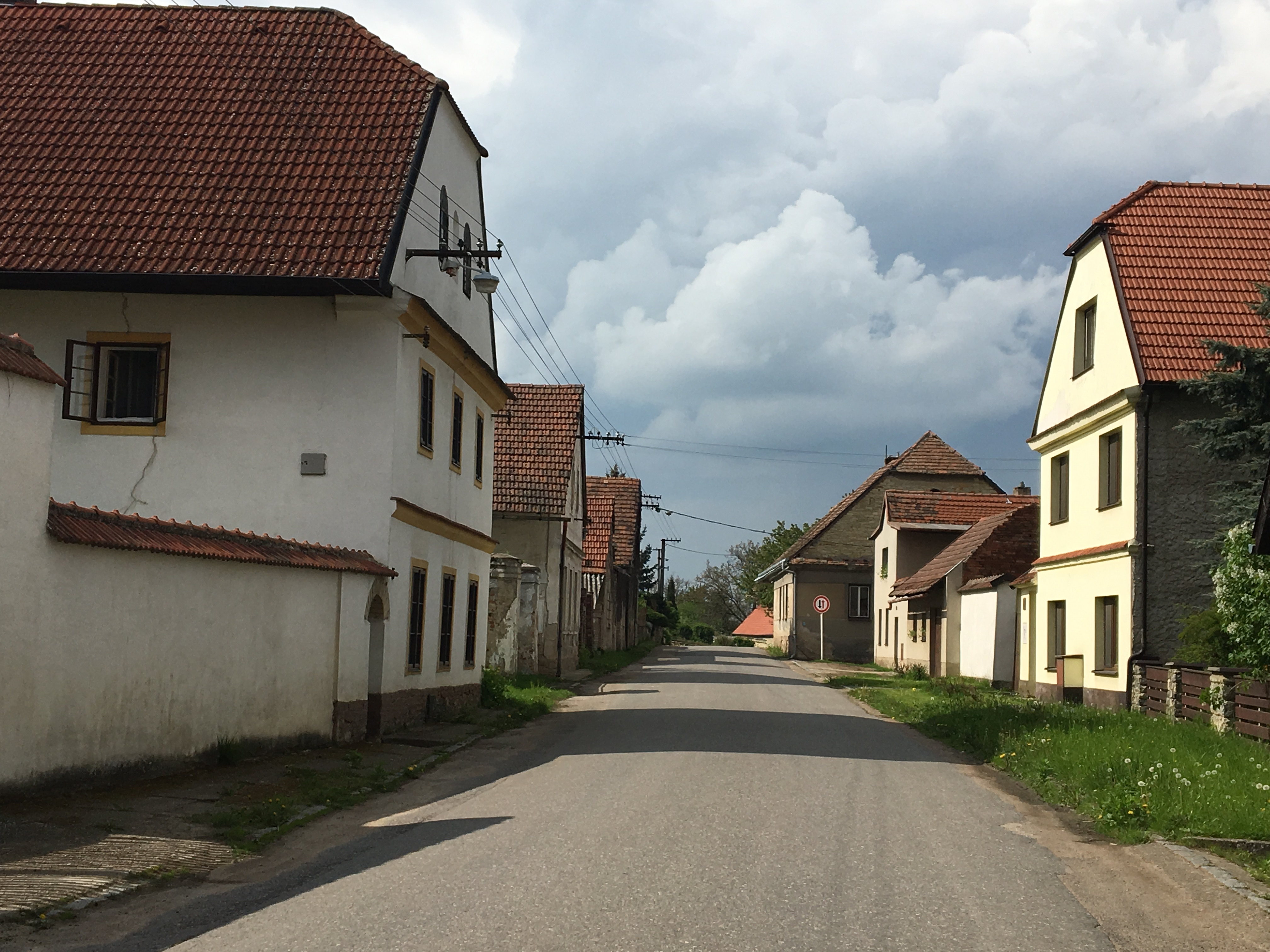 Vinary (u Vysokého Mýta) - hlavní ulice